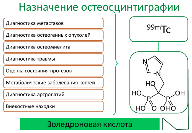 Назначение 99mTc-золедроновая кислота (Резоскан) для проведения остеосцинтиграфии.